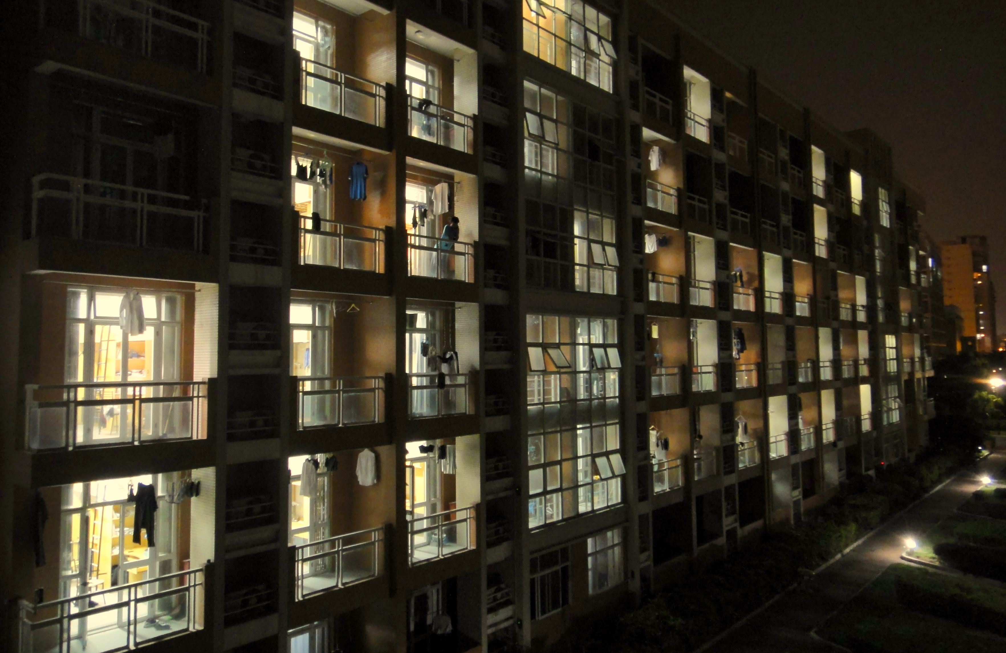 华师大二附中宿舍